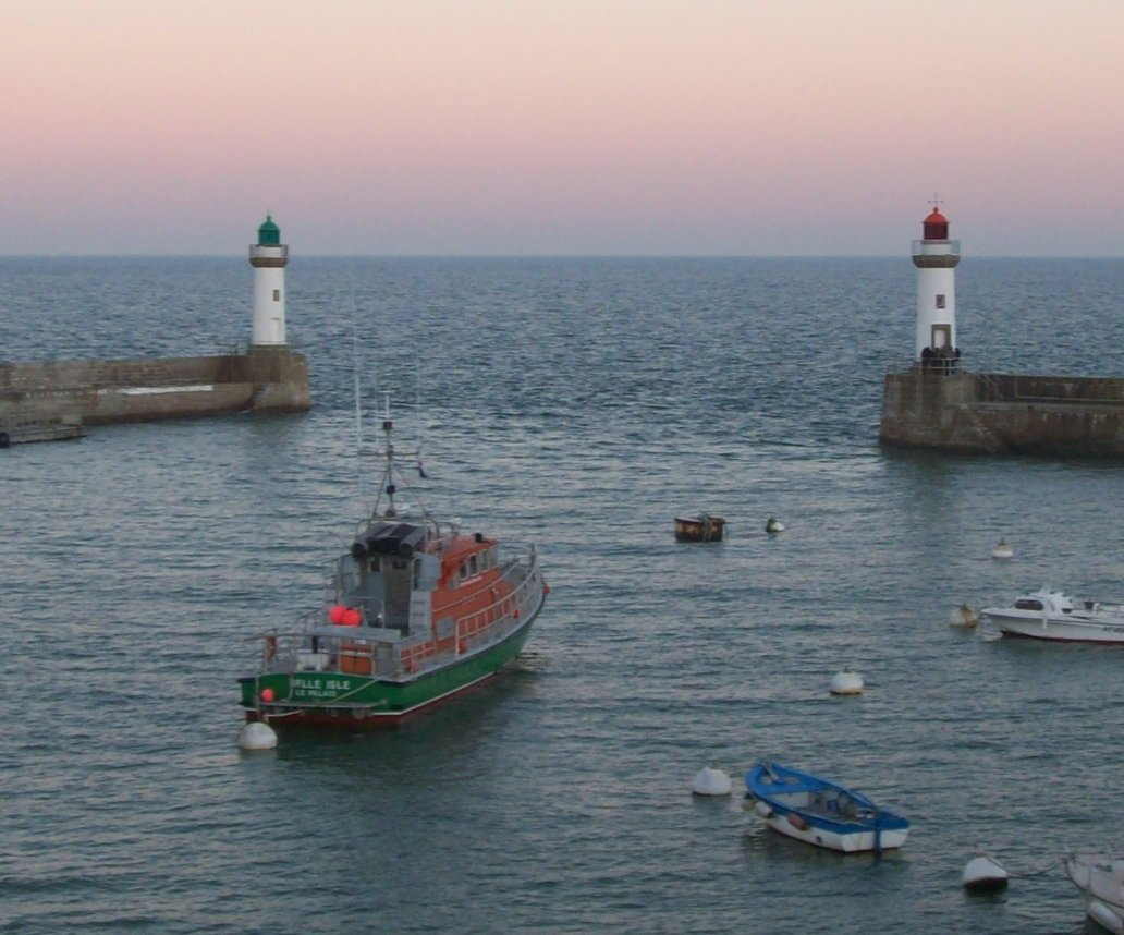 port du Palais, Belle-Île, France